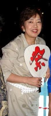 Governor of Osaka Husae Ota.